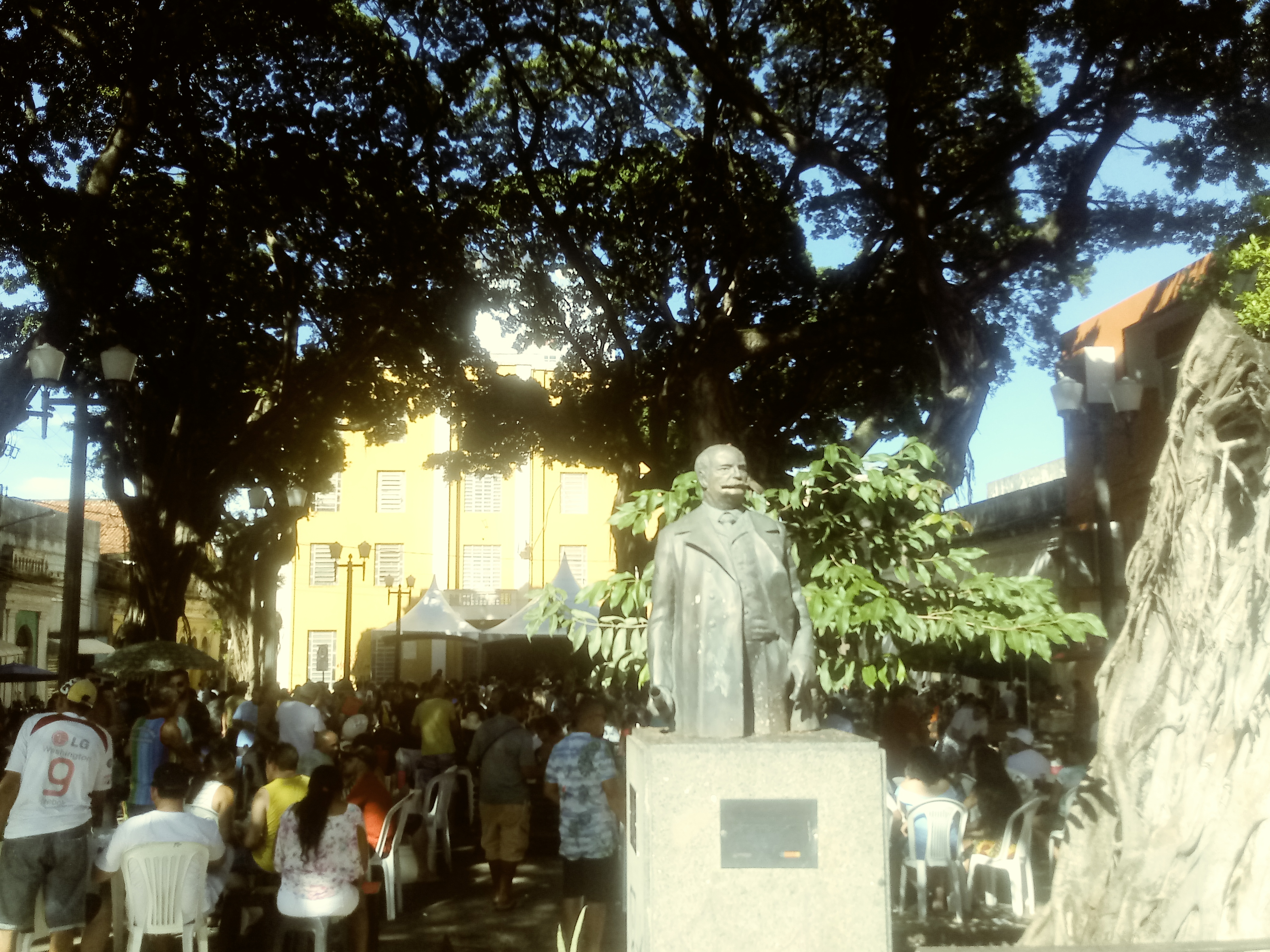 Praça Barão de Rio Branco, João Pessoa, Paraíba, praca do chorinho